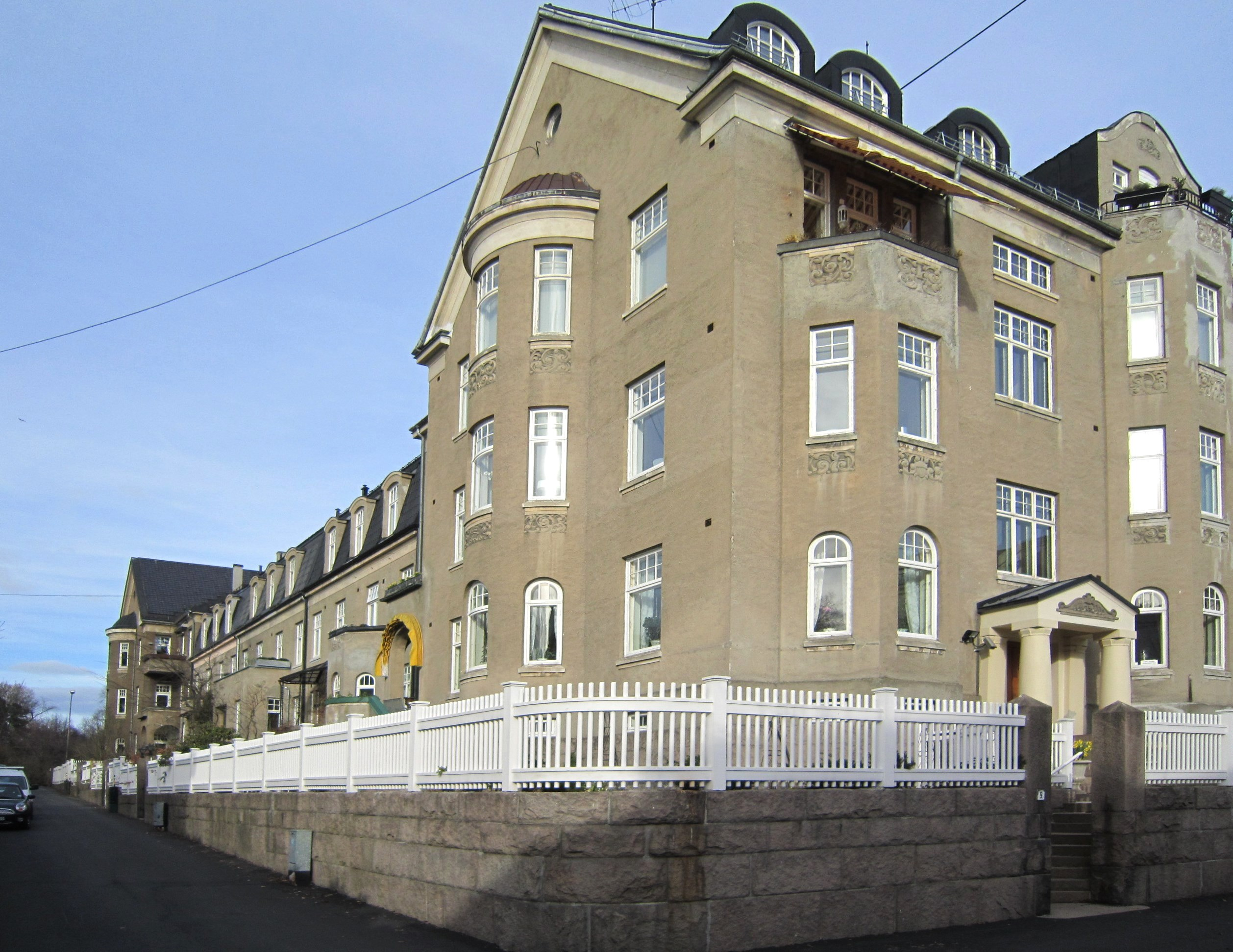 Frogner terrasse i Oslo